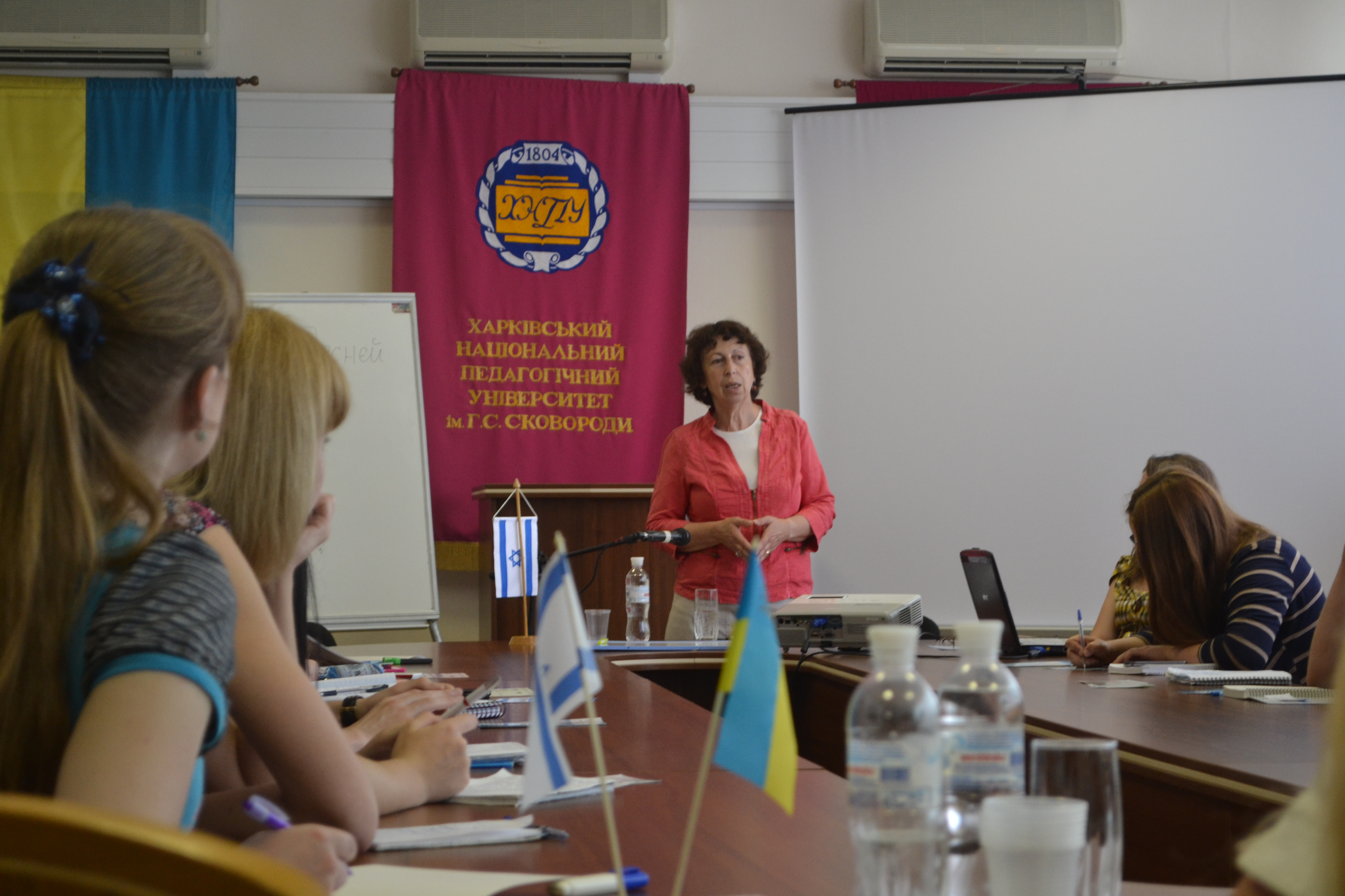 Зоя Копельман на лекции в Харьковском Национальном педагогическом университете имени Григория Сковороды в мае 2013 года